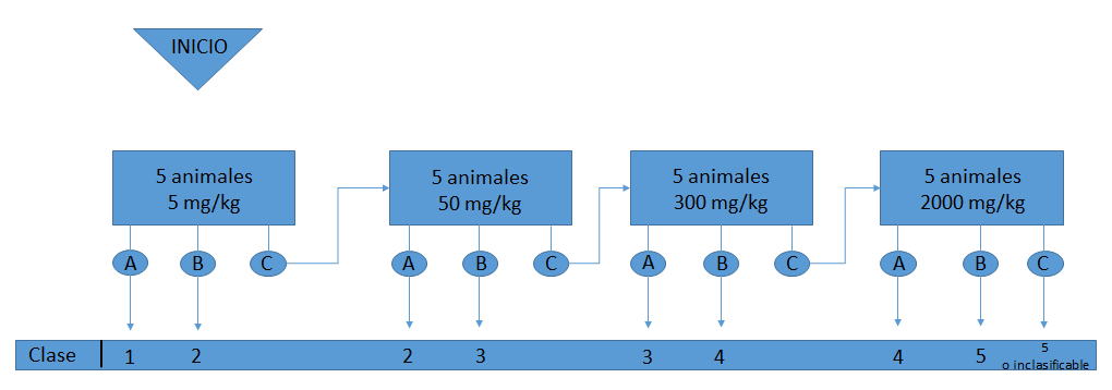 Ensayo de toxicidad aguda por vía oral por el método de la dosis fija, realizado con 5 animales por grupo hasta una dosis límite de 2000 mg/kg